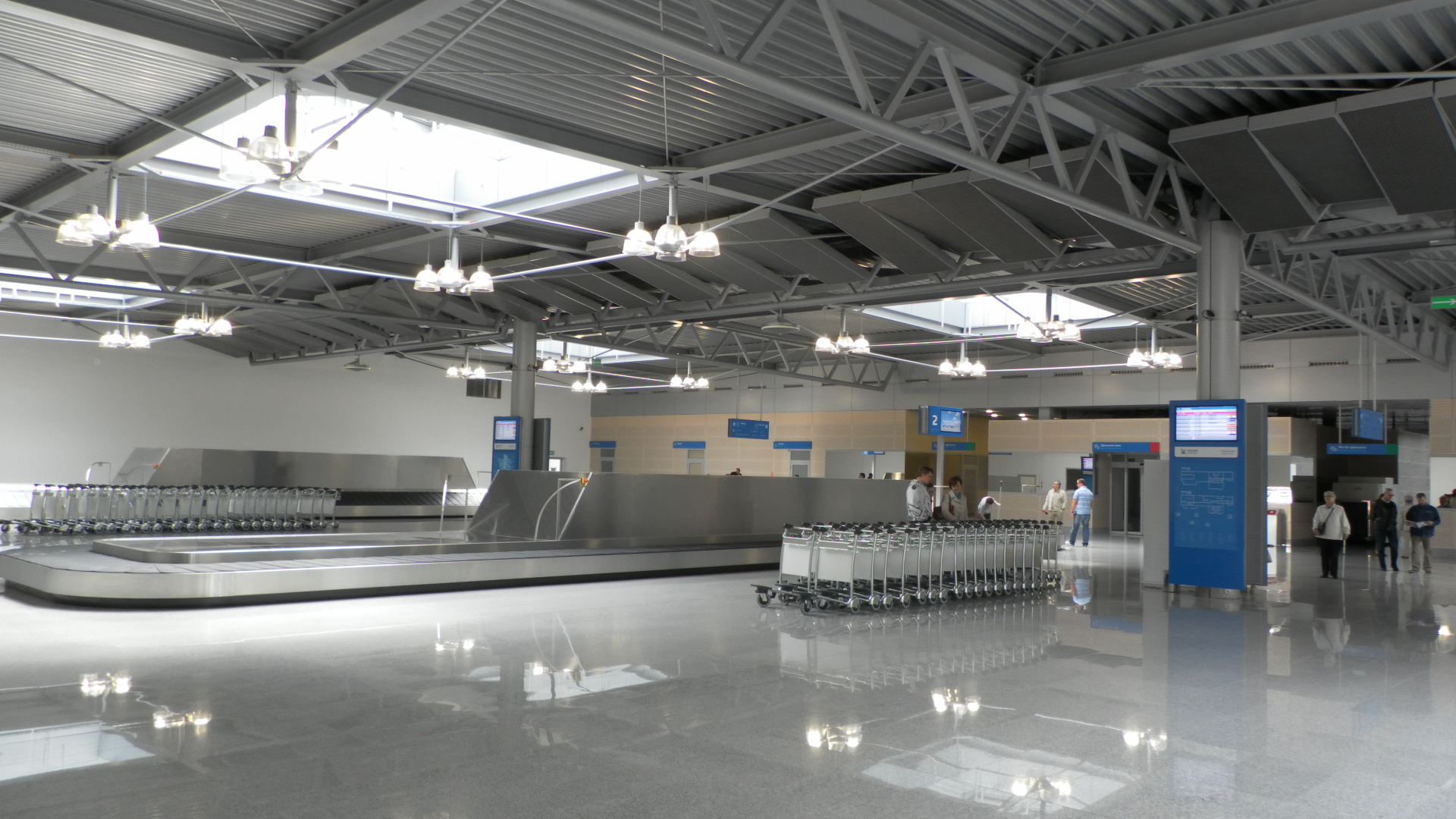 Wnętrze nowego terminala T3 (przyloty) na poznańskim lotnisku - drzwi otwarte 03.06.2012